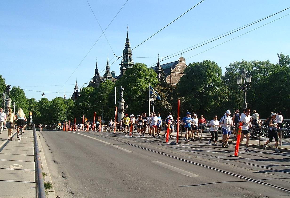 Stockholm Marathon at Djurgårdsbron, Djurgården, Stockholm.